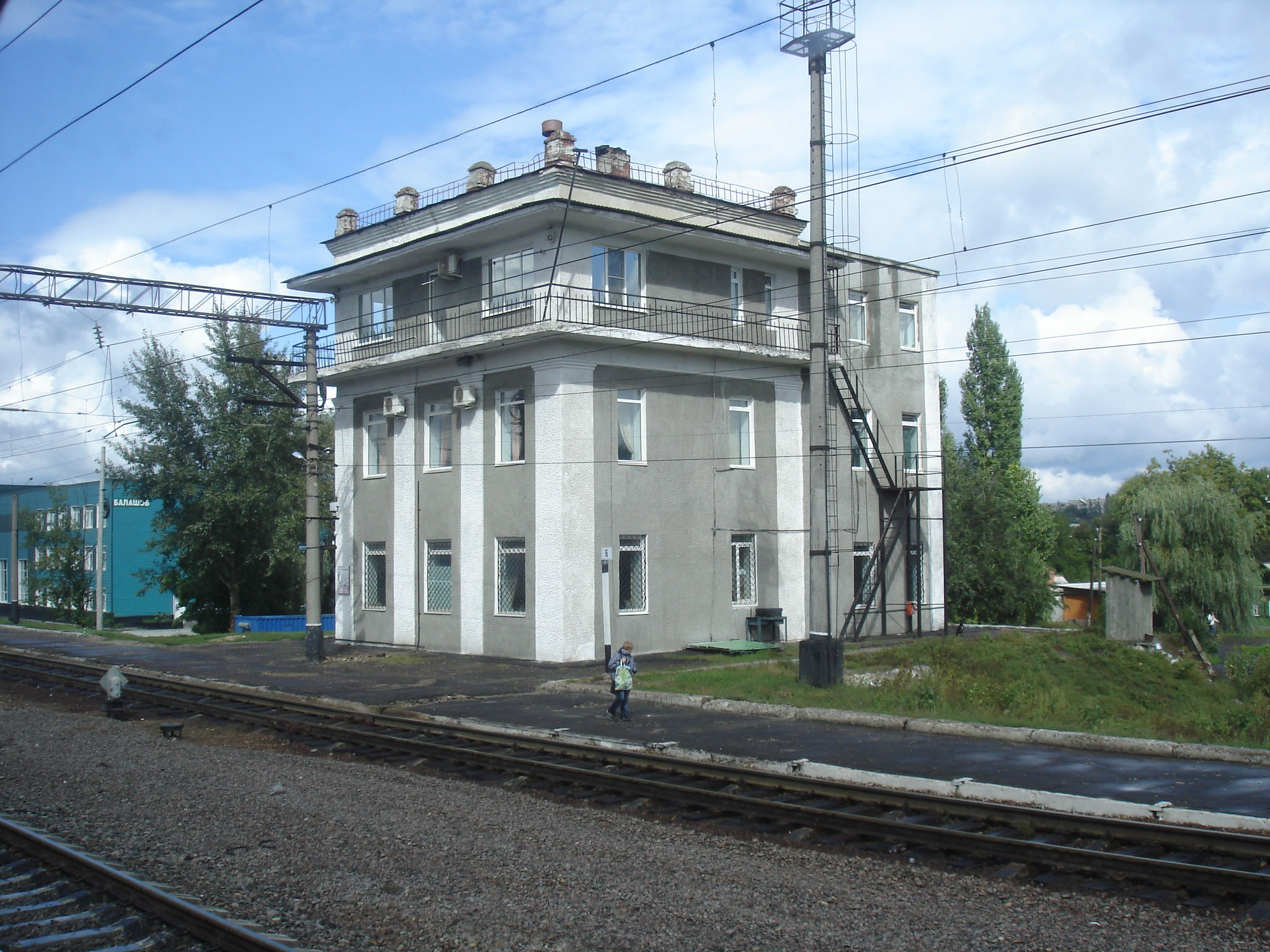 Балашов, станционное здание